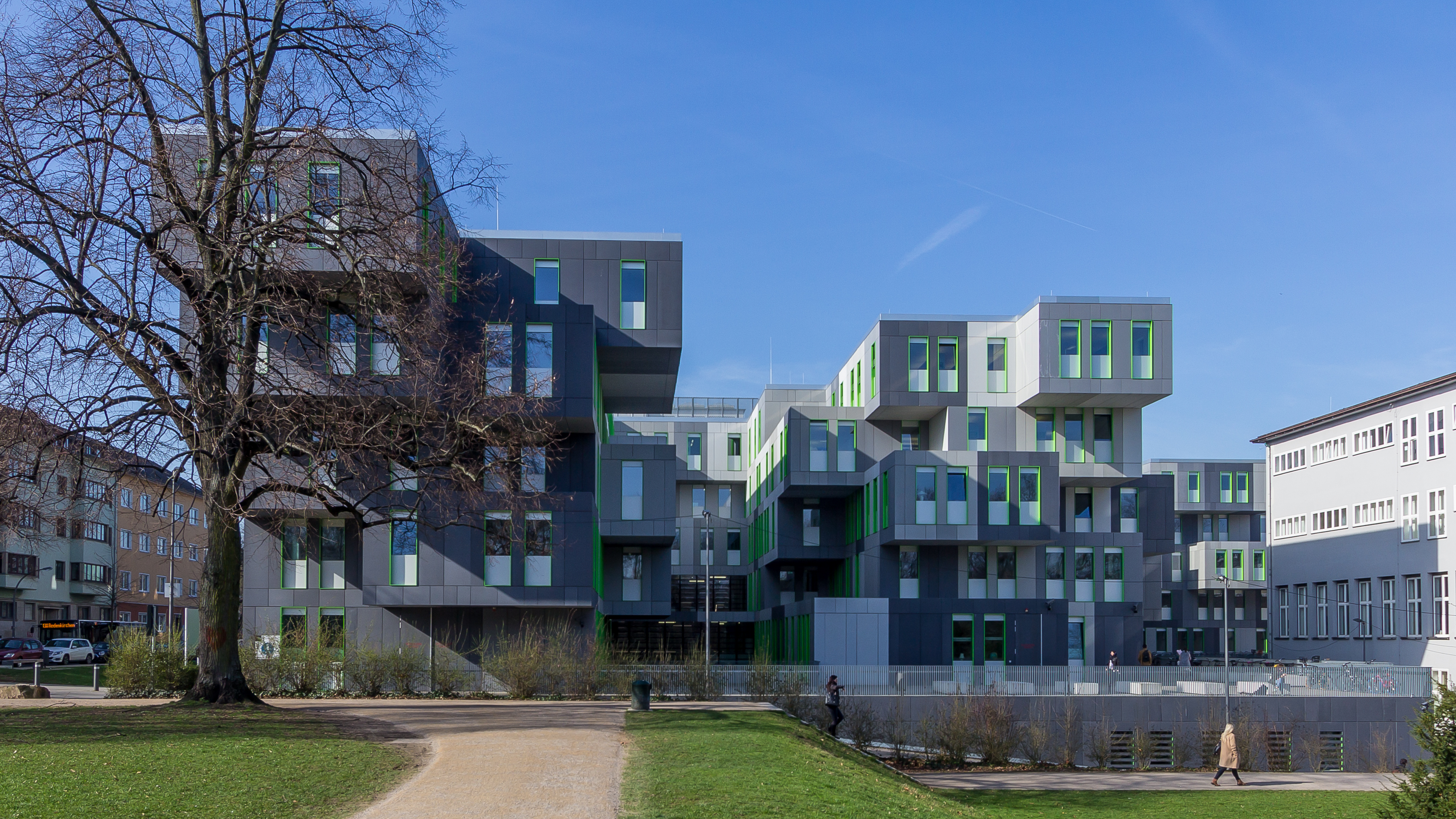 Studierenden Service Center, Universität zu Köln (Gebäude 102). Architekt: Schuster Architekten, Düsseldorf. Bauzeit: 2011-2013